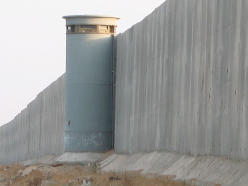 Israeli West Bank barrier